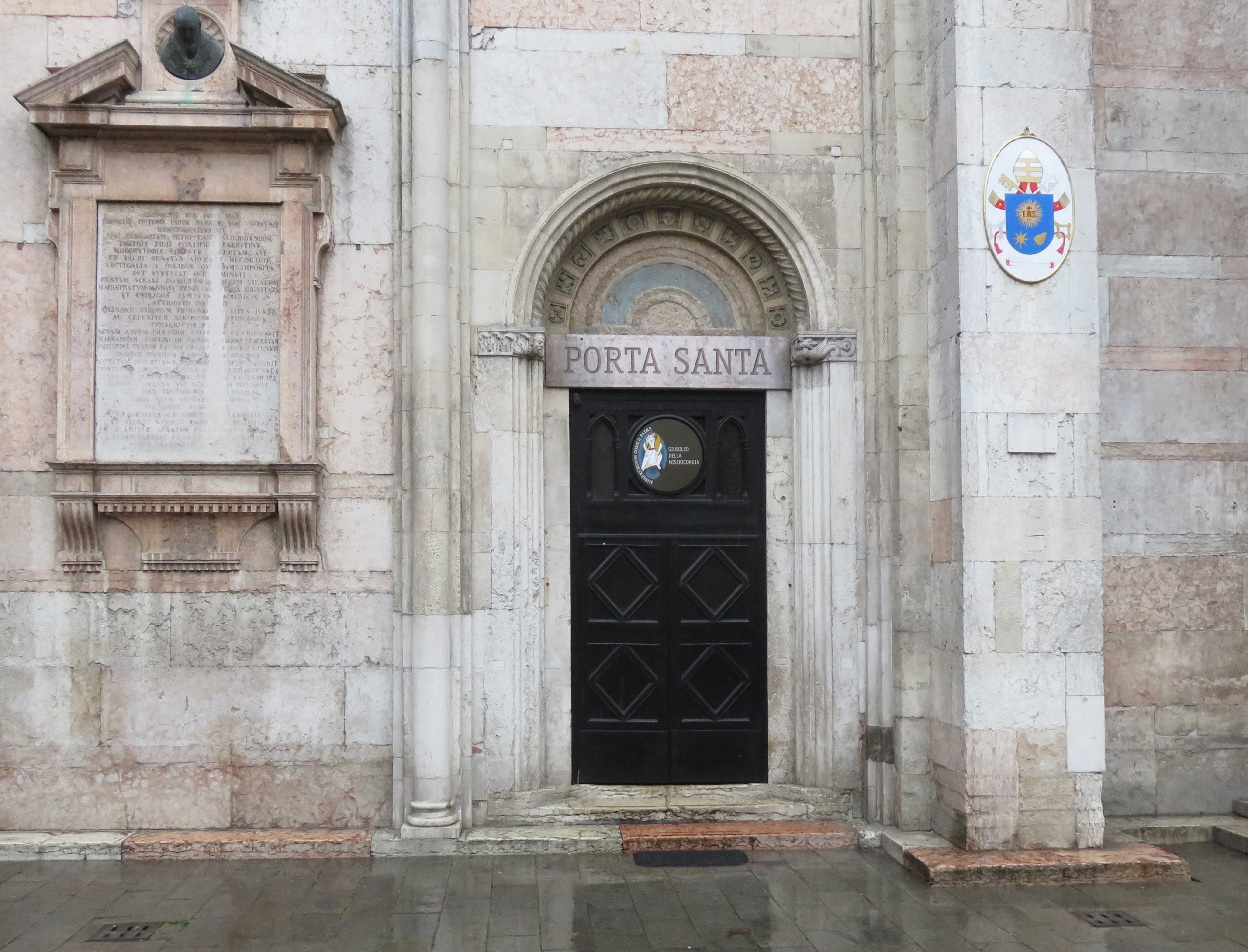 La porta santa della Cattedrale di Ferrara per il Giubileo straordinario della misericordia presente dal 2015 al 2016